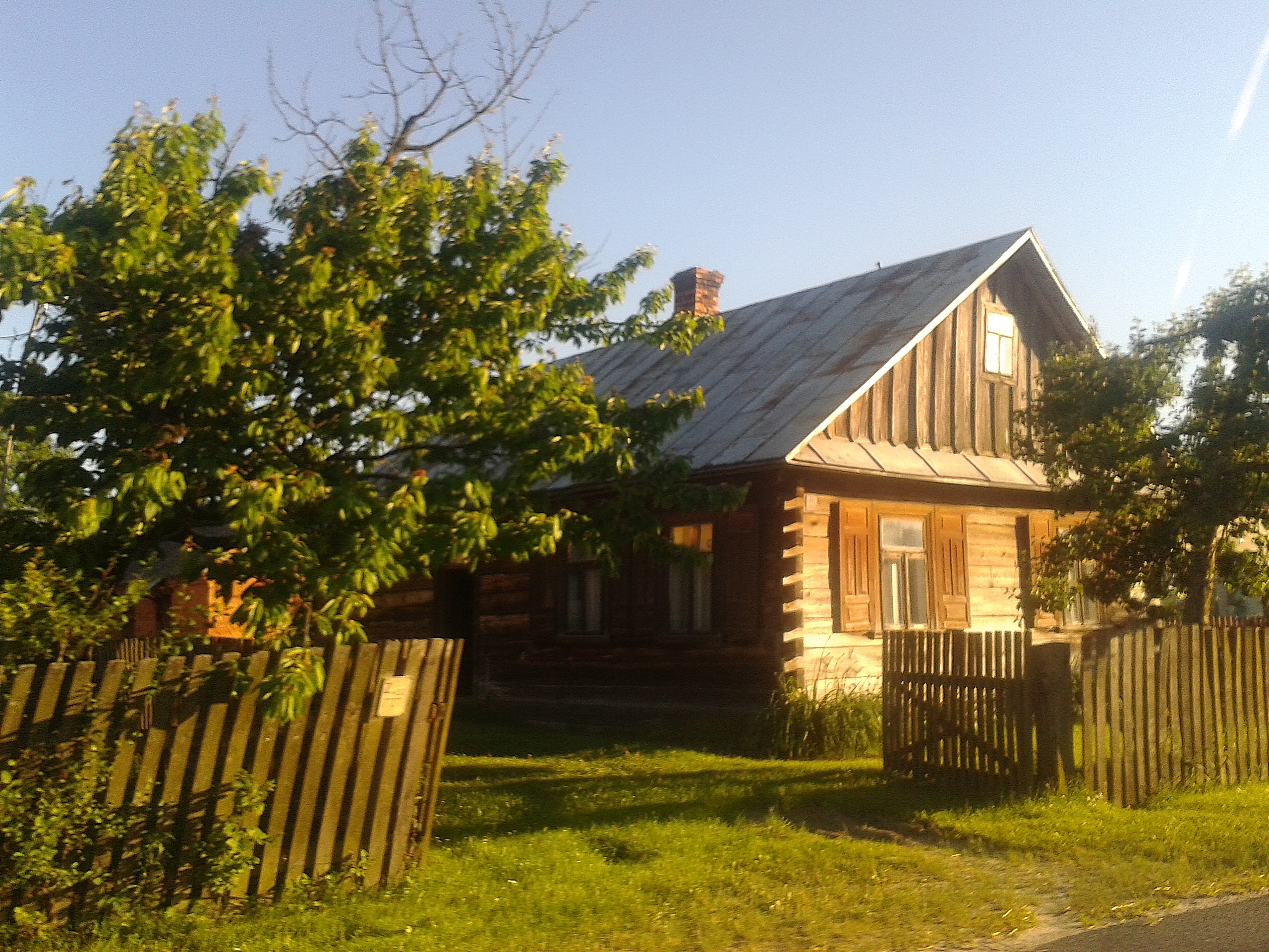 Drewniany dom w Kaplonosach